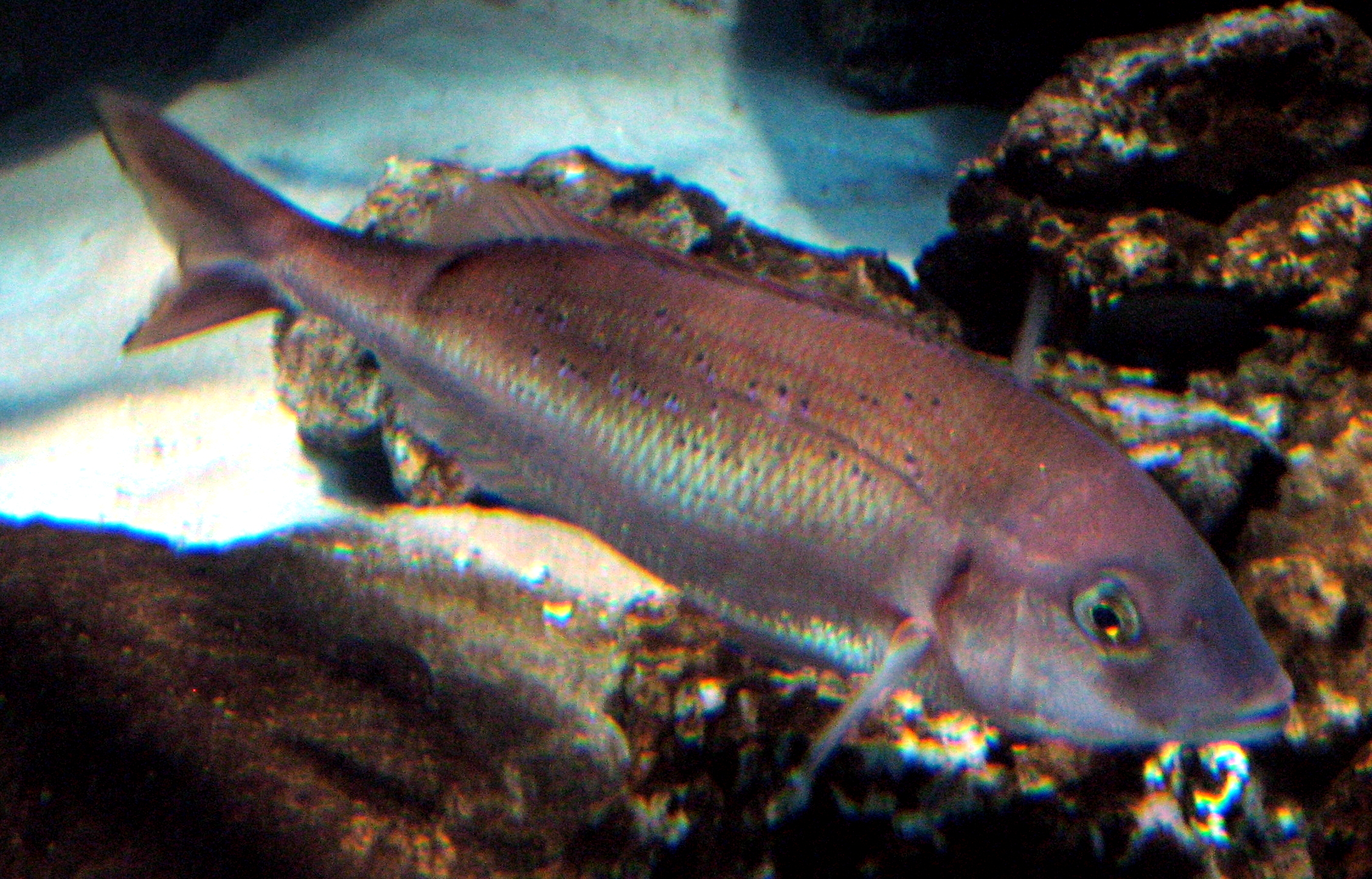 Pagrus pagrus in Aquarium Cinéaqua Map: 48° 51' 44" N 2° 17' 27" E